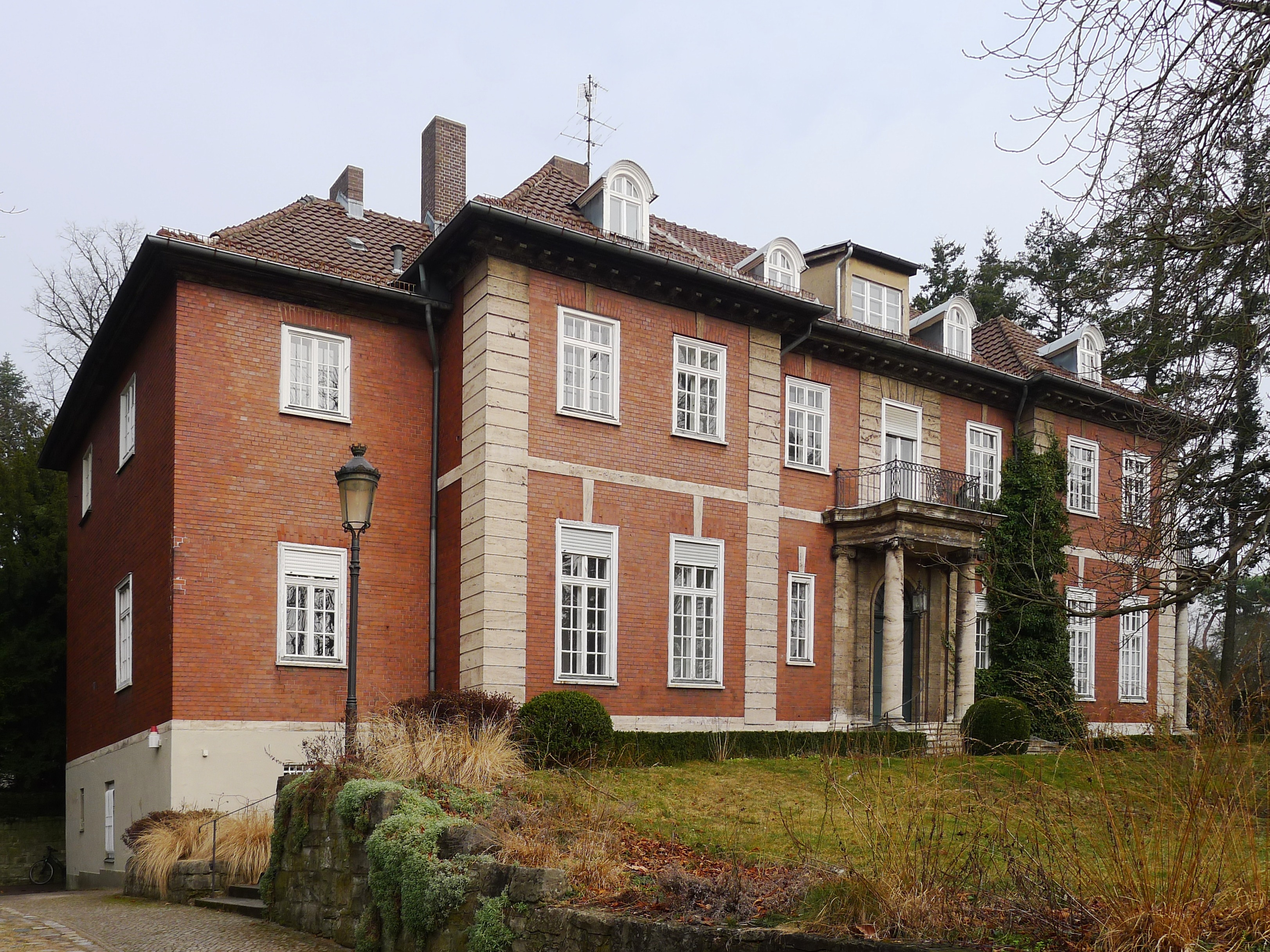 Einfamilienhaus